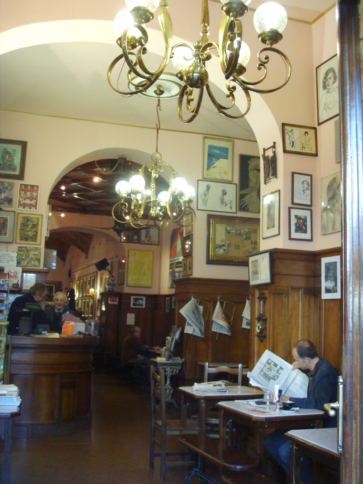 Caffé giubbe rosse interno